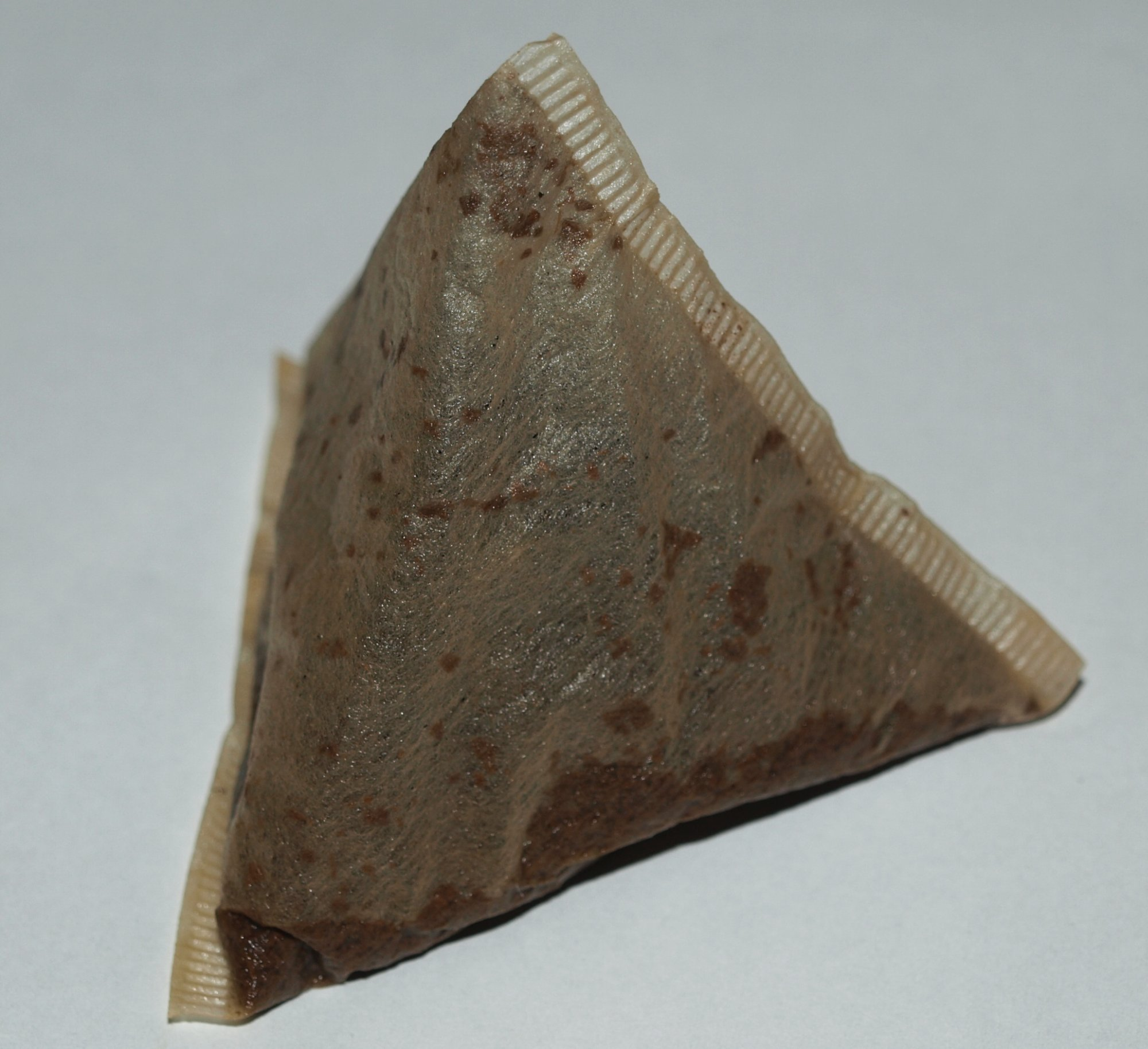 Tetraederförmiger PG Tips-Teebeutel